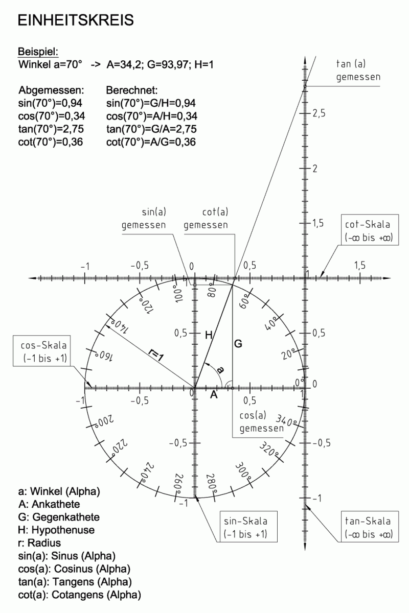 Winkelfunktionen an Einheitskreis.